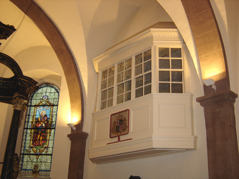 Log vun der Groussherzoglecher Famill an der Colmer Kierch